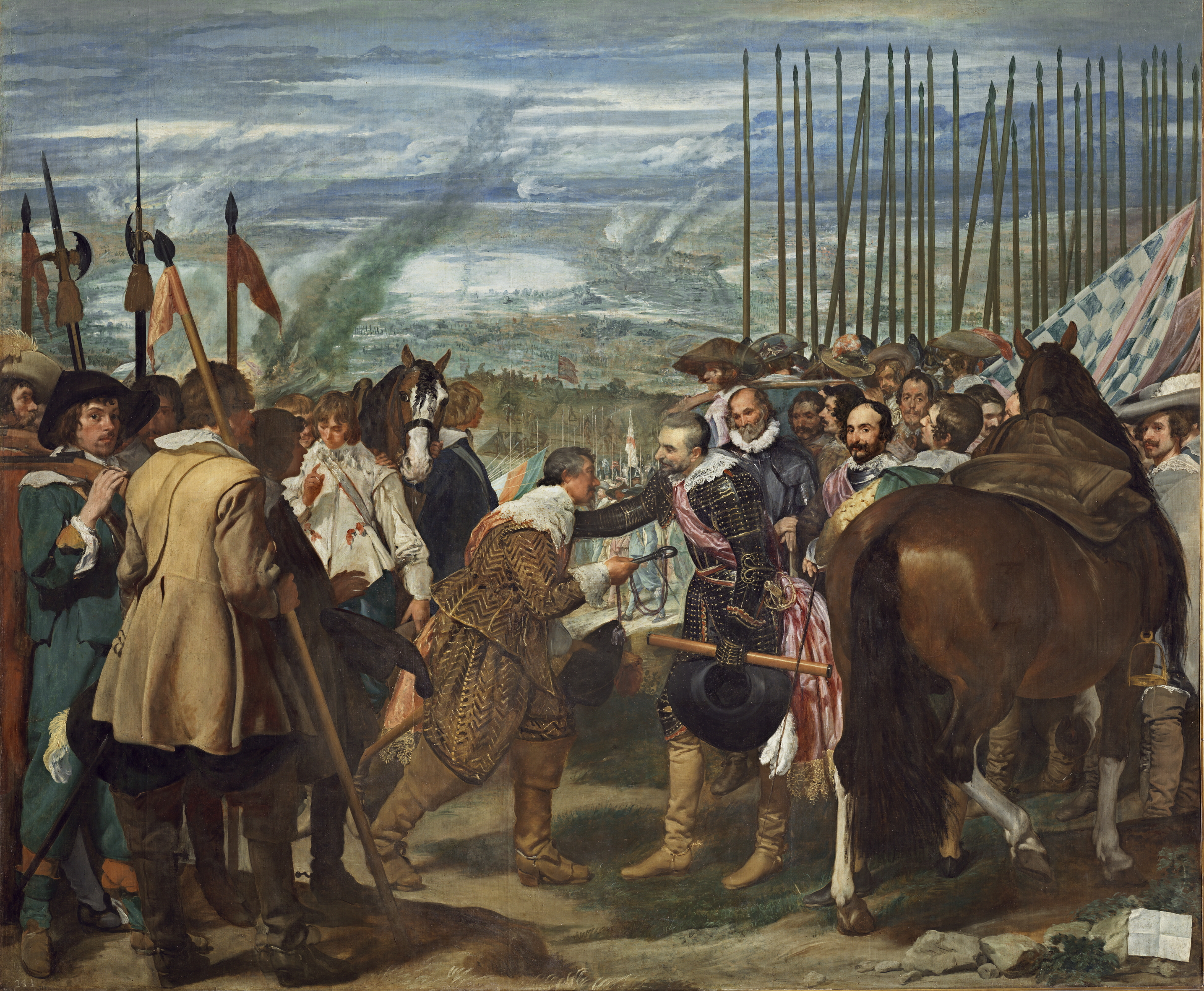 La obra representa el momento en que Justino de Nassau rindió la ciudad de Breda, en 1625, a las tropas españolas al mando del general Ambrosio Spínola, que aparece recibiendo las llaves de la ciudad de manos de su enemigo.